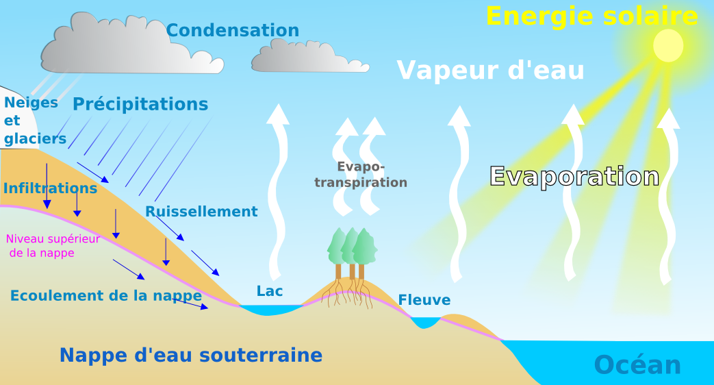 Cycle_de_l'eau